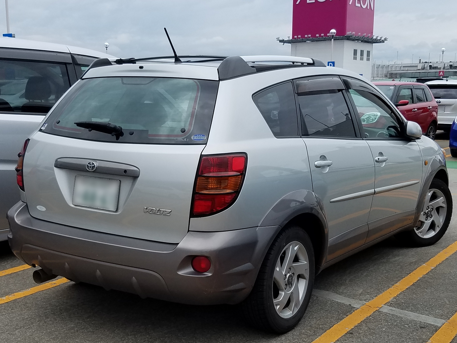 ヴォルツ S